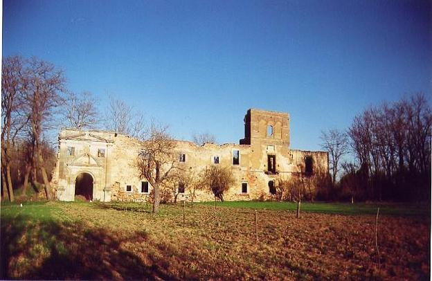 Ruinas del antiguo Monasterio de Santa Maria en San Esteban de Nogales, Leon, España